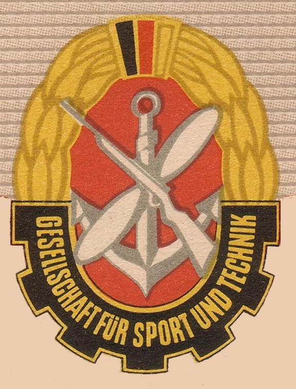 Symbol der Gesellschaft für Sport und Technik (GST) in der DDR von 1955